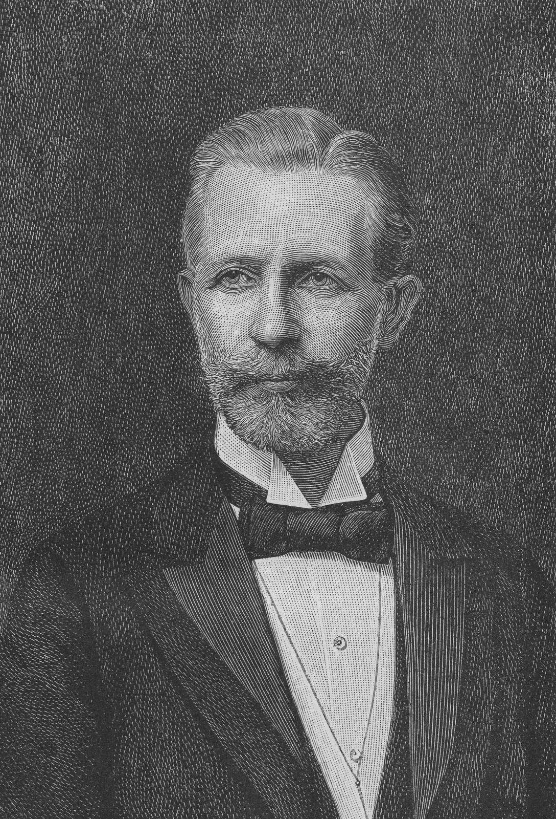 Wilhelm Schultz (1854–1921)